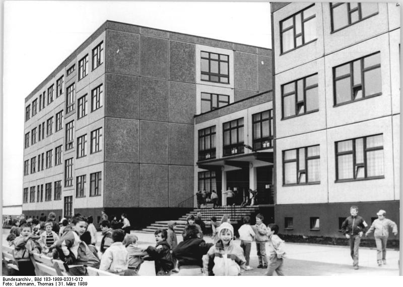 Halle, Silberhöhe, Oberschule ADN-ZB Lehmann 31.3.89 Halle: Bilanz - Neue Schule. Mit der Eröffnung der 13. Oberschule im Hallenser Neubaugebiet Silberhöhe haben sich die Lehr- und Ausbildungsbedingungen in dem rund 50.000 Einwohner zählenden Wohngebiet weiter verbessert. Der moderne Schultyp SBR 80 weist einige Vorteile auf: Verbesserte Arbeitsbedingungen für Lehrer und Schüler, drei relativ separate Gebäudeteile für Unter-, Mittel- und Oberstufe sowie Sanitäranlagen auf jeder Etage. Seit Beginn des zweiten Schulhalbjahres unterrichten hier 28 Pädagogen15 Klassen der Stufen 1 bis 6.